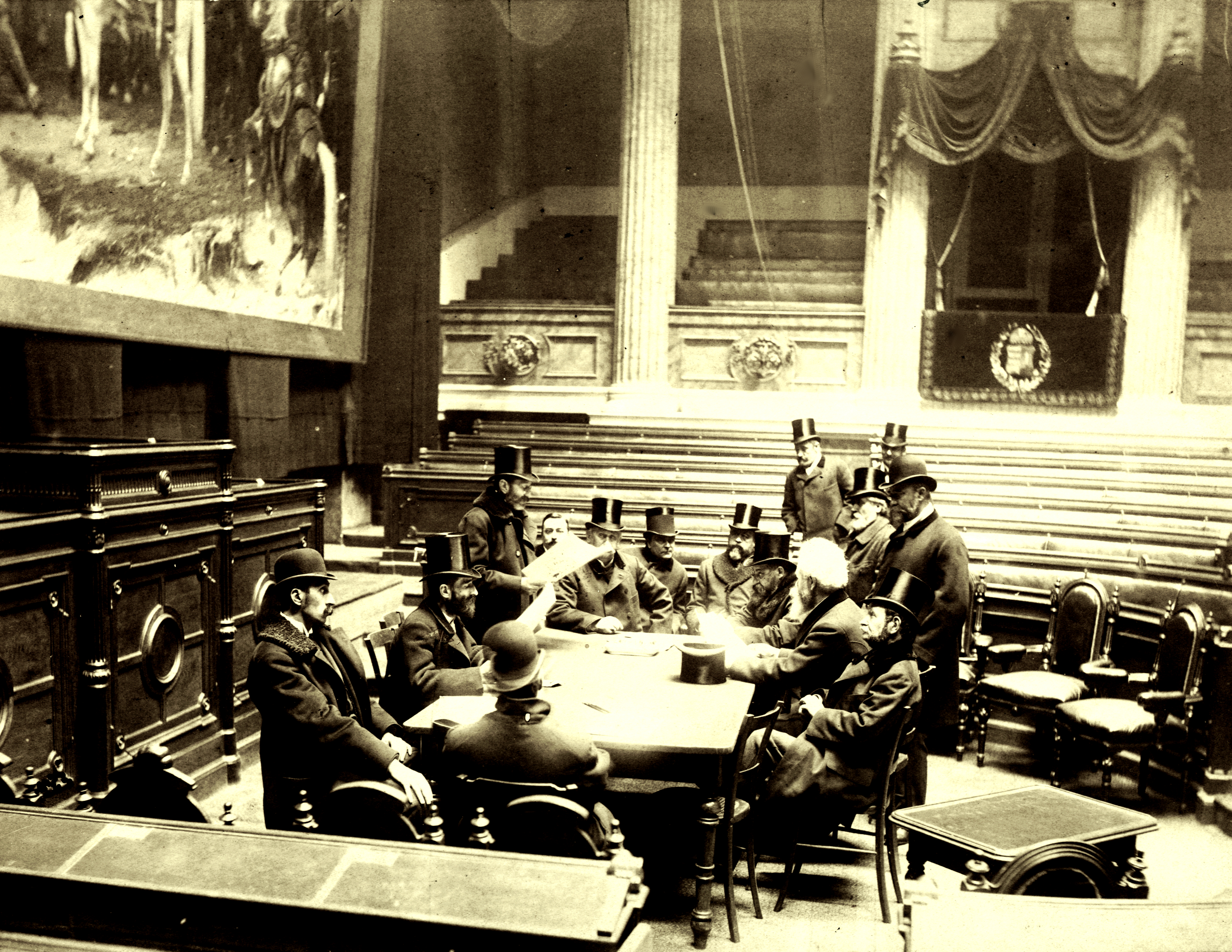 A Magyar Nemzeti Múzeum díszterme, ekkor főrendiházi ülésterem. Munkácsy Mihály Honfoglalás című festményének átvétele, az Országház építkezése Végrehajtó Bizottságának ülésén. Az előadó Neÿ Béla (állva olvas), tőle balra gróf Szapáry István, jobb oldalán Szmrecsányi Miklós. Velük szemben kalap nélkül Munkácsy Mihály, az ő háta mögött Steindl Imre áll, mellette Telepy Károly, a művész bal oldalán báró Harkányi Frigyes. A felvétel 1894 telén készült